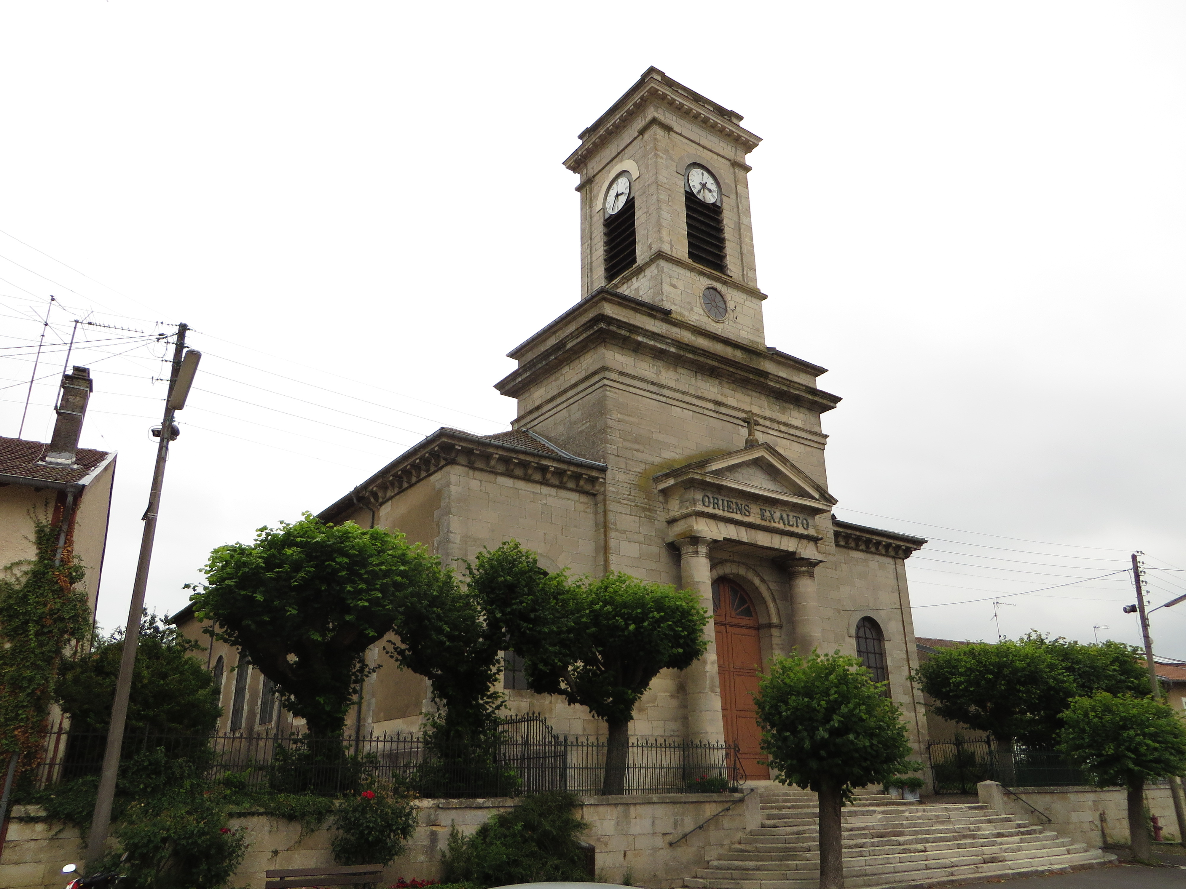 Hannonville-sous-les-Côtes L'église paroissiale Saint-Martin